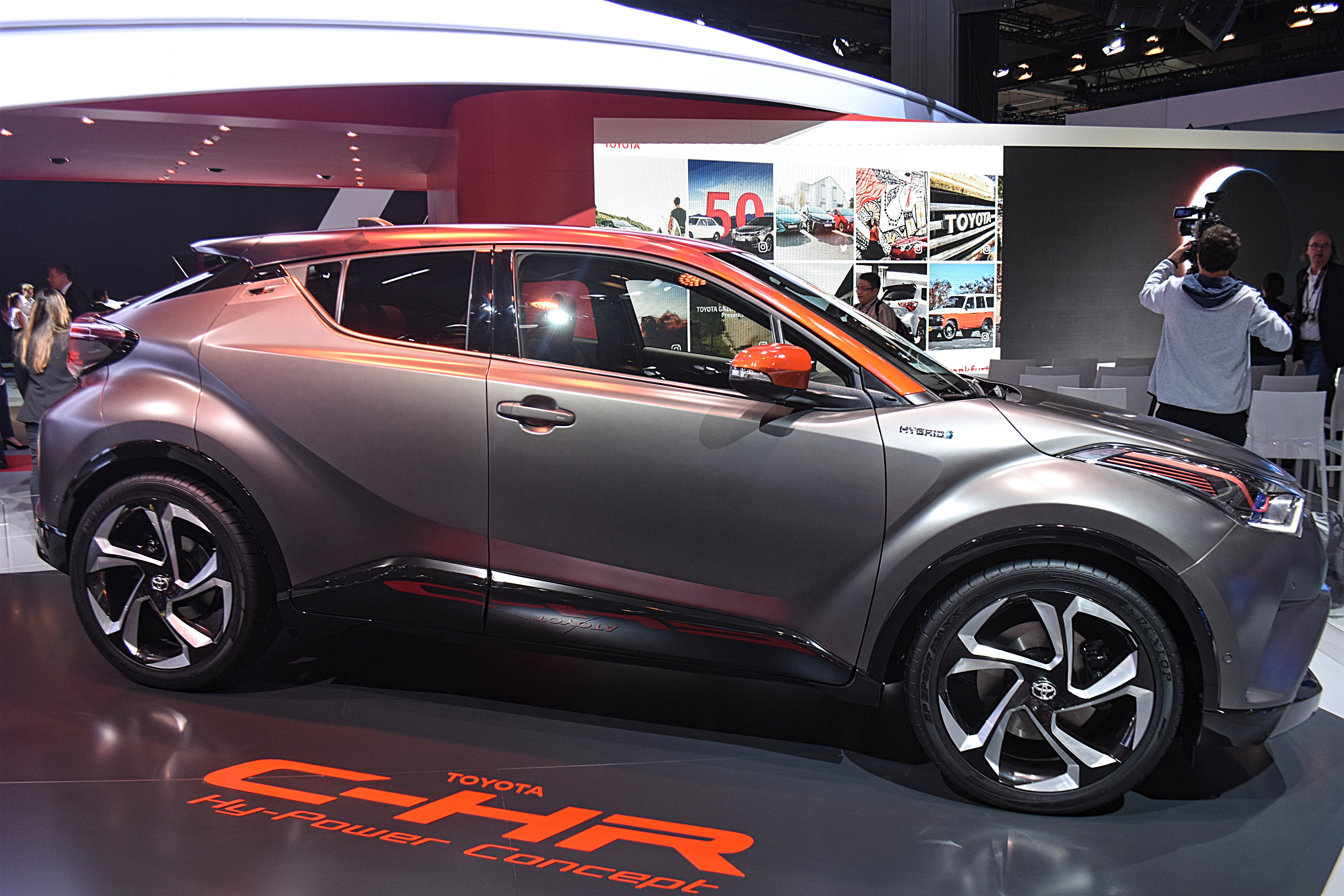 Toyota C-HR Hy-Power Concept auf der IAA 2017 am 12. September 2017.